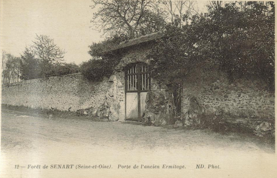 Forêt de Sénart, porte de l'ancien ermitage Carte postale ancienne